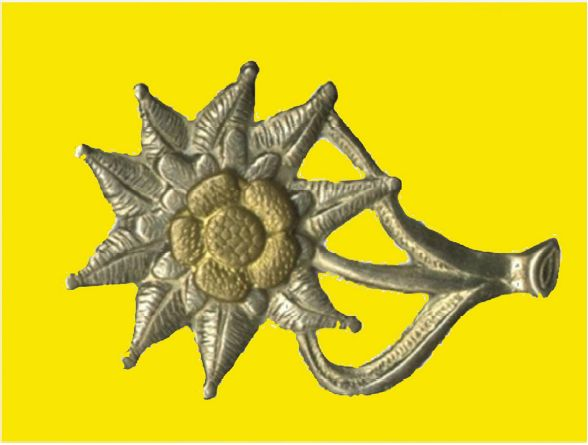 WZÓR GRAFICZNY PROPORCZYKA NA BERET 21. BATALIONU LOGISTYCZNEGO